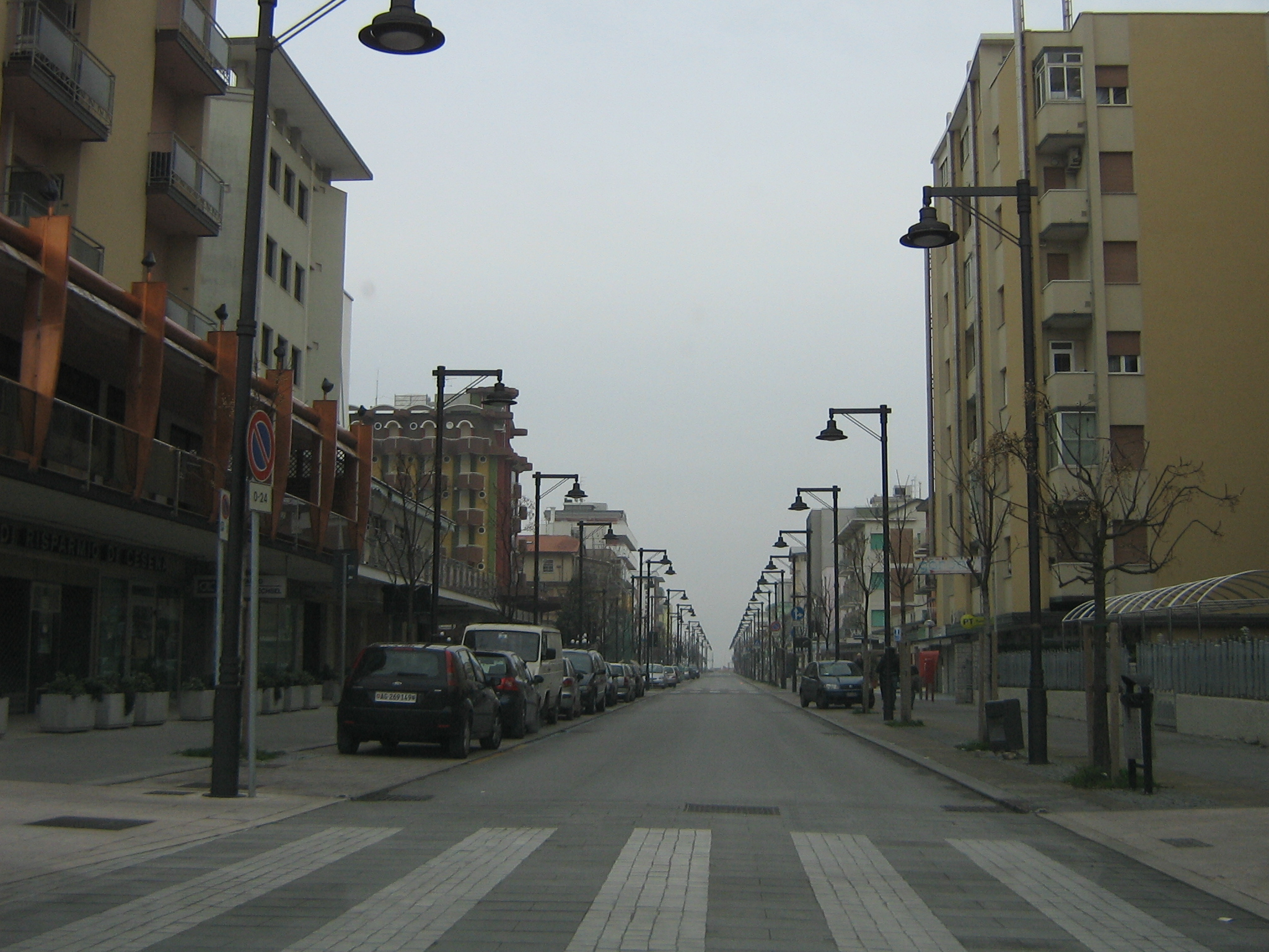 Lungomare, Gatteo a mare (FC), Italy